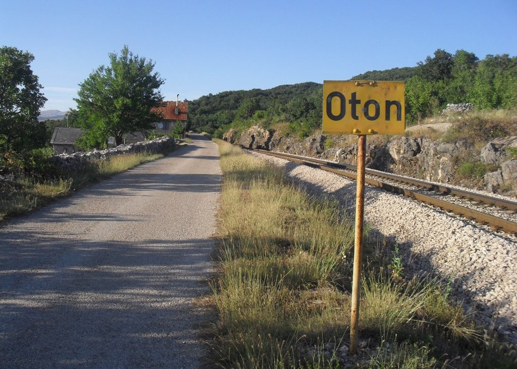 Улаз у Отон из правца Пађена, десно Личка пруга, Далмација